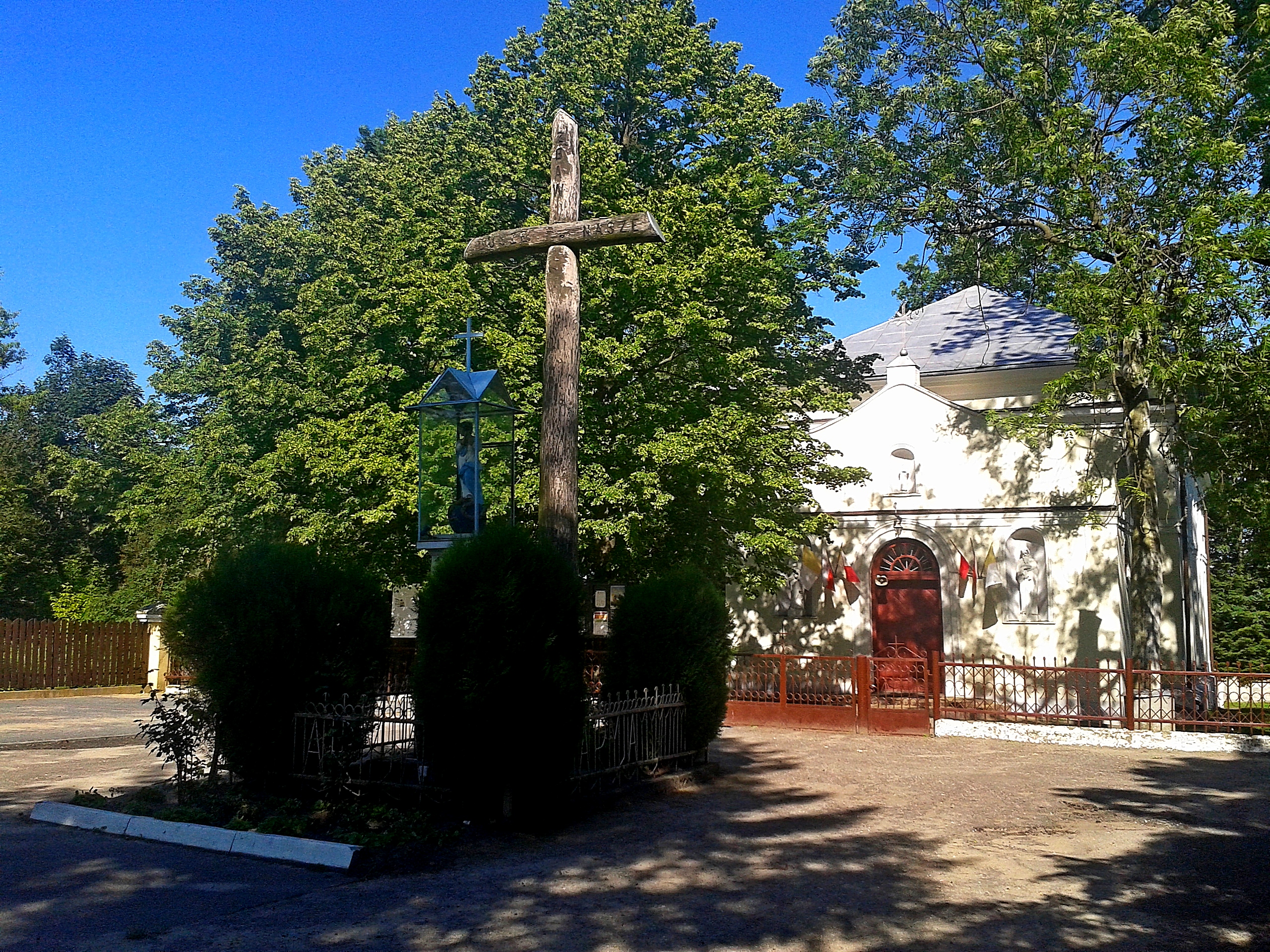 Przed kościołem w Wirowie